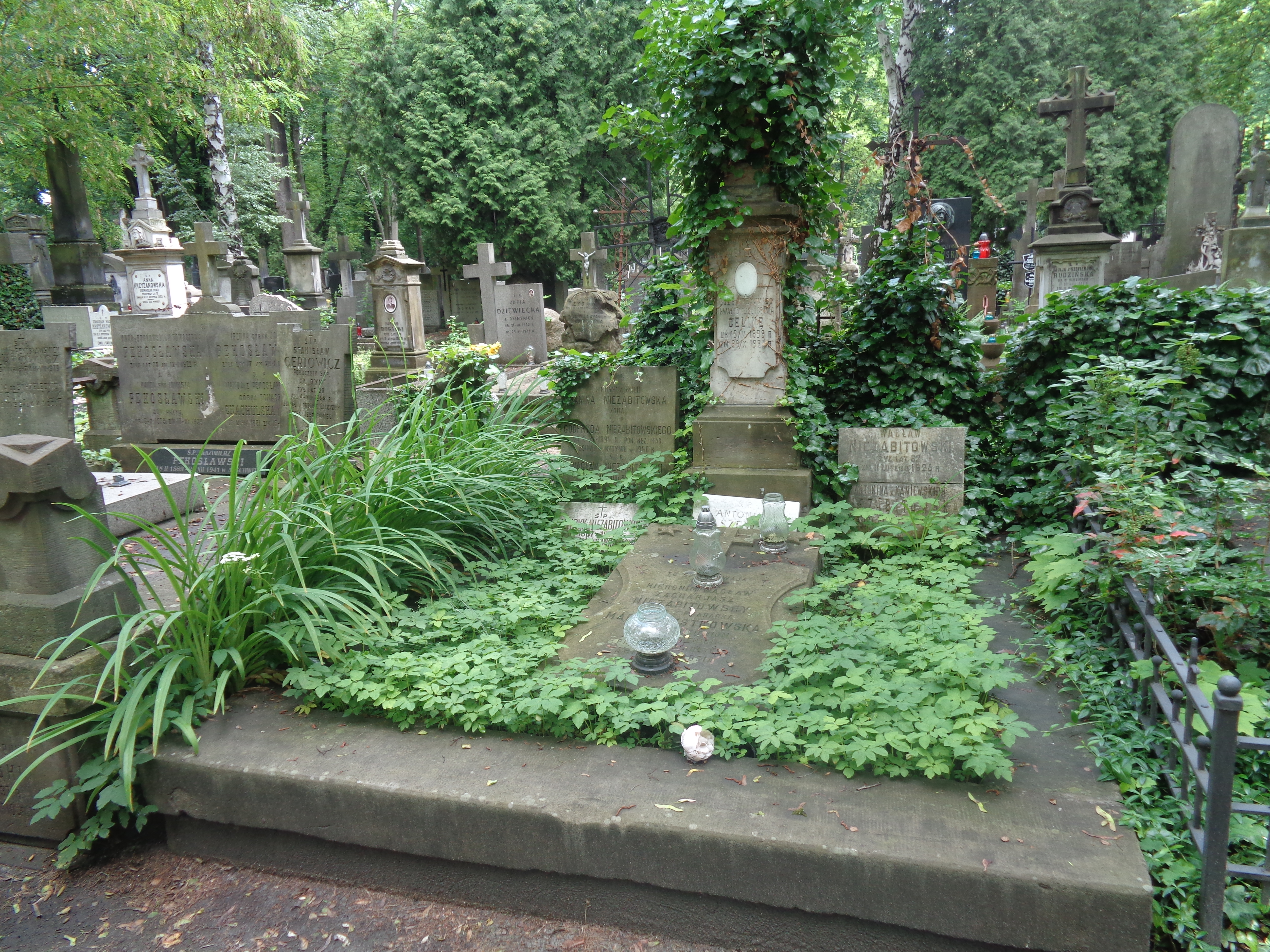 Grób Henryka Niezabitowskiego na Cmentarzu Powązkowskim